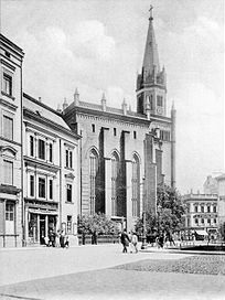 Altstädtische Kirche von der Poststr